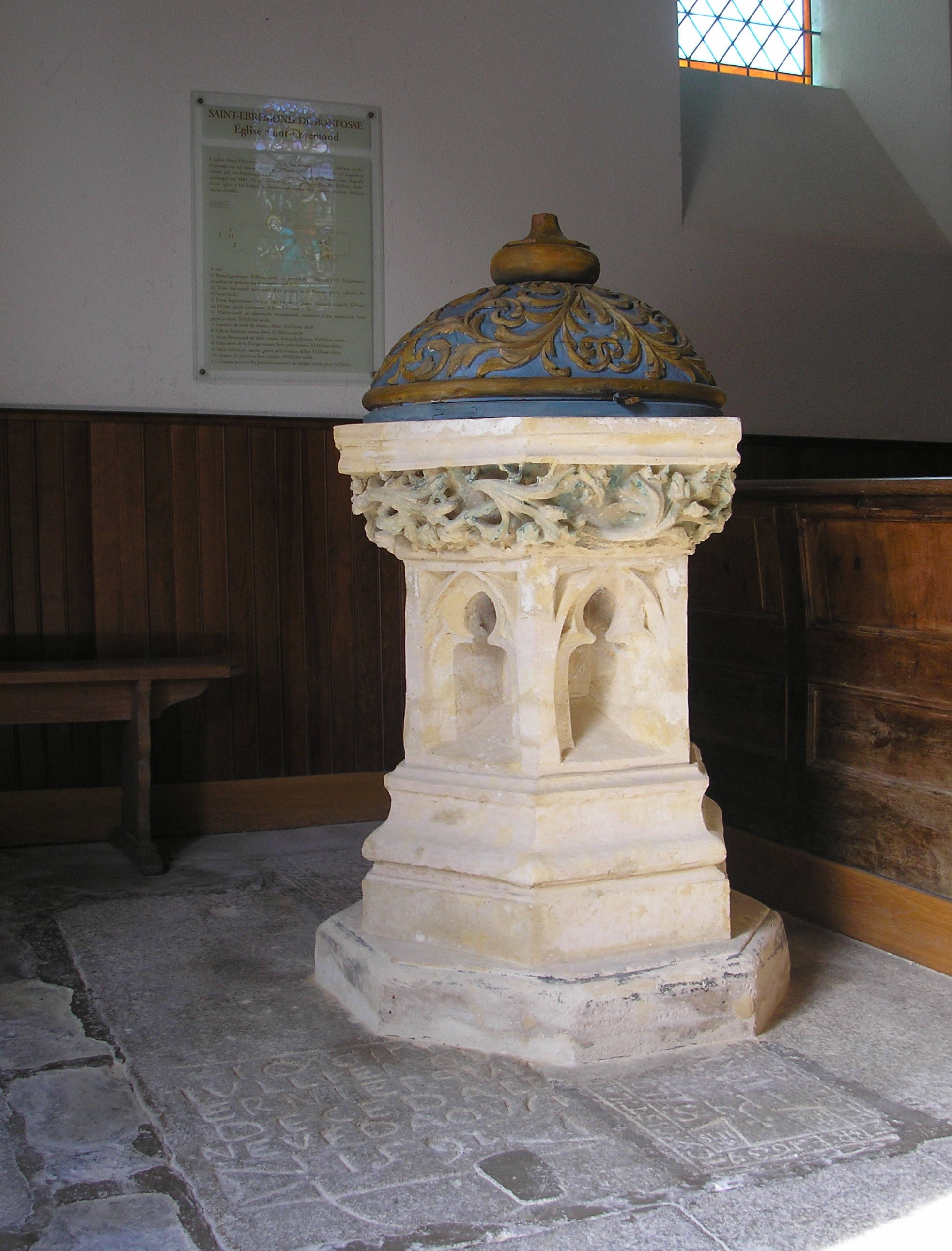 Saint-Ébremond-de-Bonfossé (Normandie, France). Fonts baptismaux de l'église Saint-Ébremond, cuve du XIVe siècle, couvercle du XVIIIè.